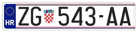 Nove registarske oznake